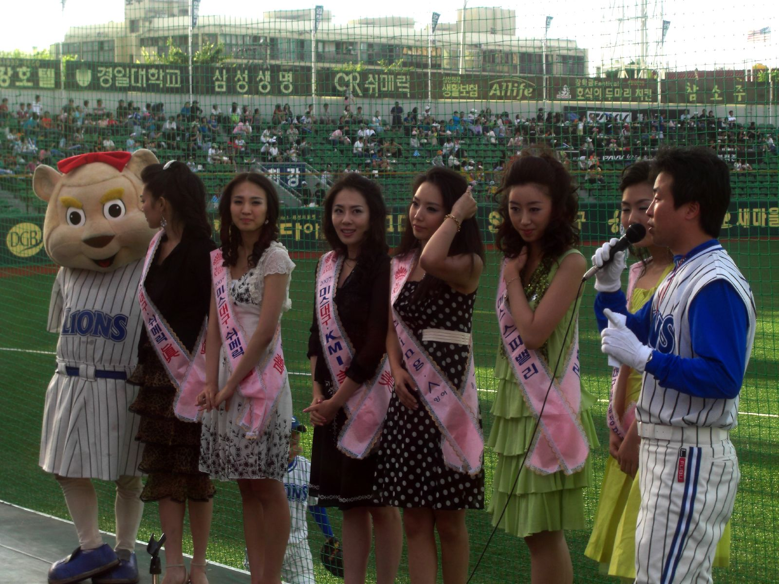 대구 진 이겨레, 대구 선 황인혜, 대구 미 이은비, 미스 ing.^ 박유미, 미스 스파밸리 허은나, 미스 대구산업정보대학 정선진.